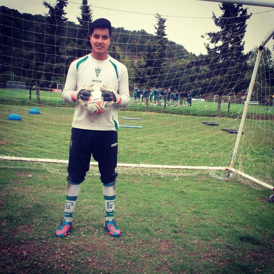 Entrenamiento en Mantagua